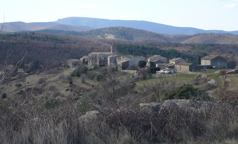 Vue générale de Saint-Andéol-de-Berg en Ardèche